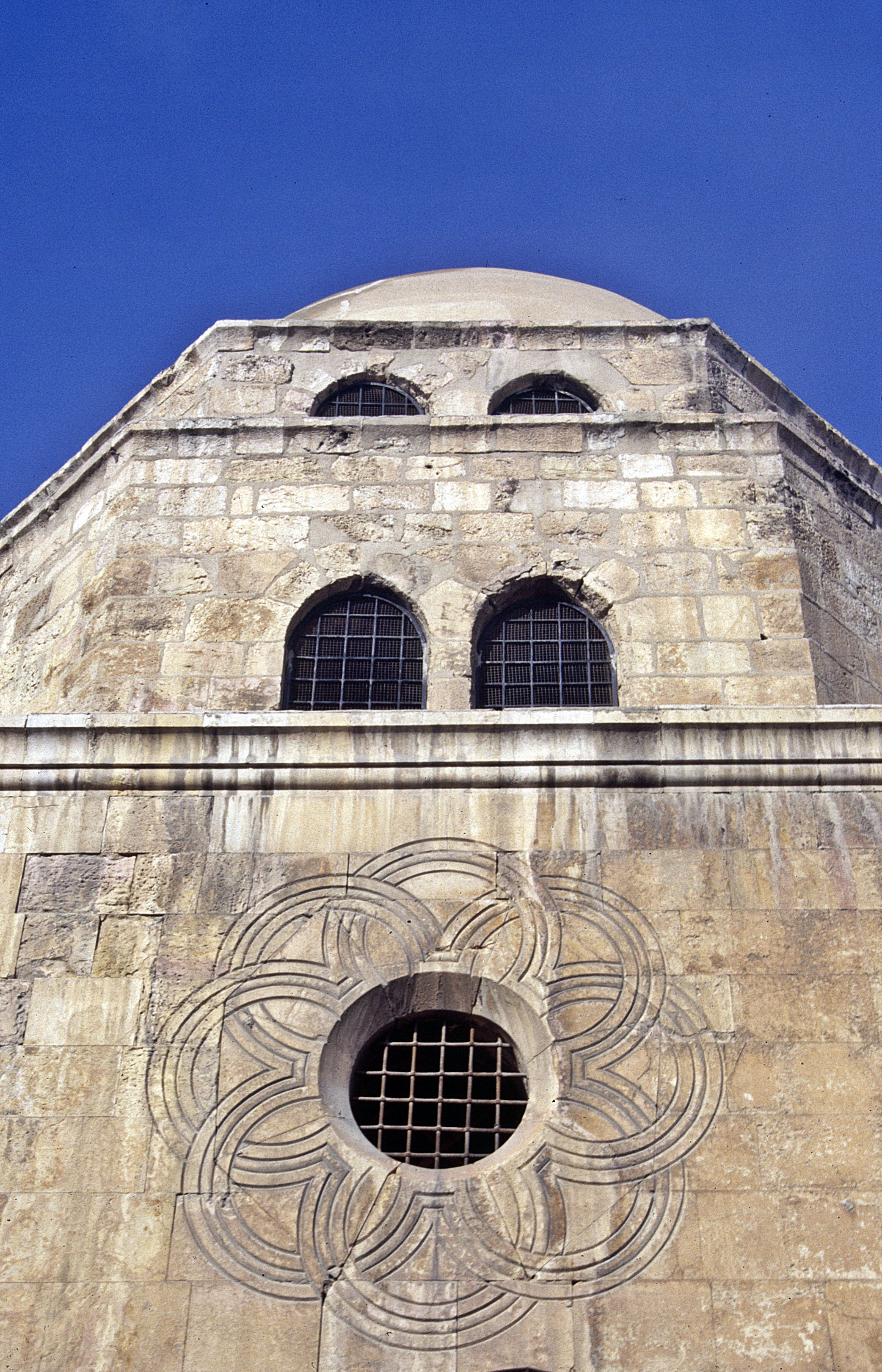 Damaskus: Baibar-Mausoleum